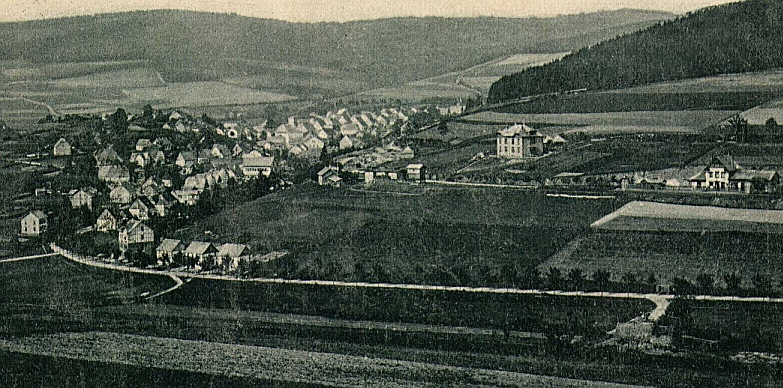 Fredeburg (Germany), Anno 1900